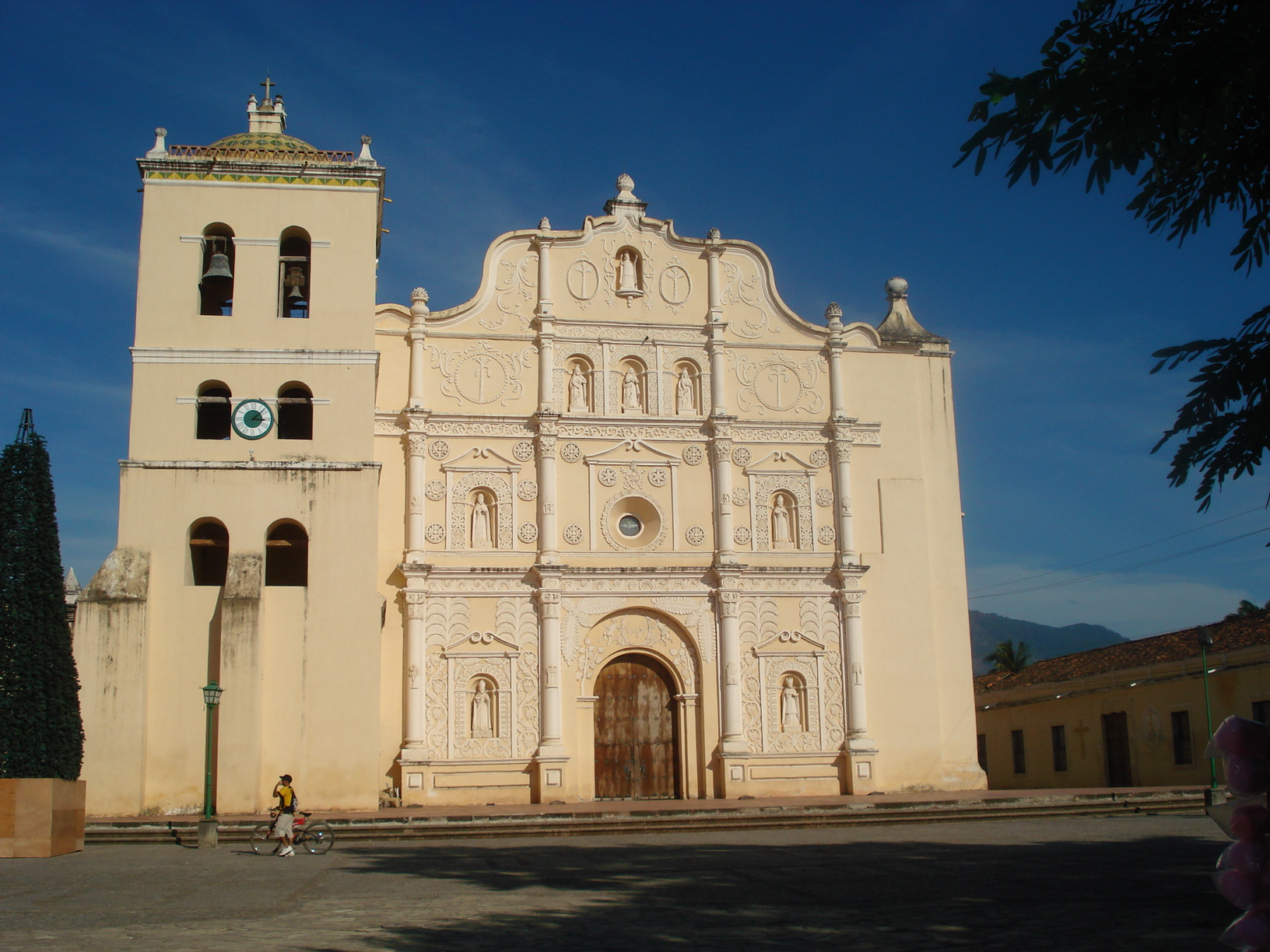 Catedral de Comayagua, antigua capital de la República de Honduras.